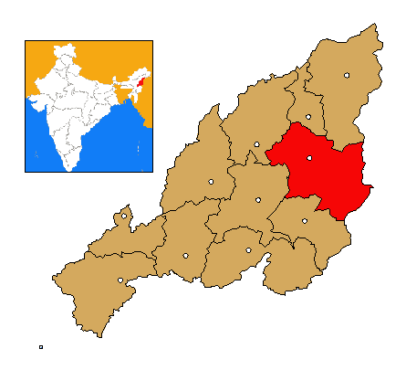 Mapa de localización del distrito